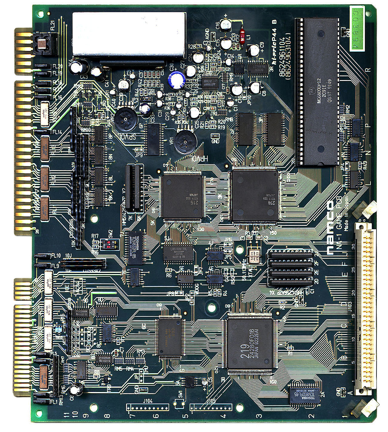 ARCADE GAME PCB NAMCO NA-1 GAME PCB (only MAIN PCB) 基板形番：8624961104 （シルク記載形番） 基板形番：8624963104 （エッチング文字形番）